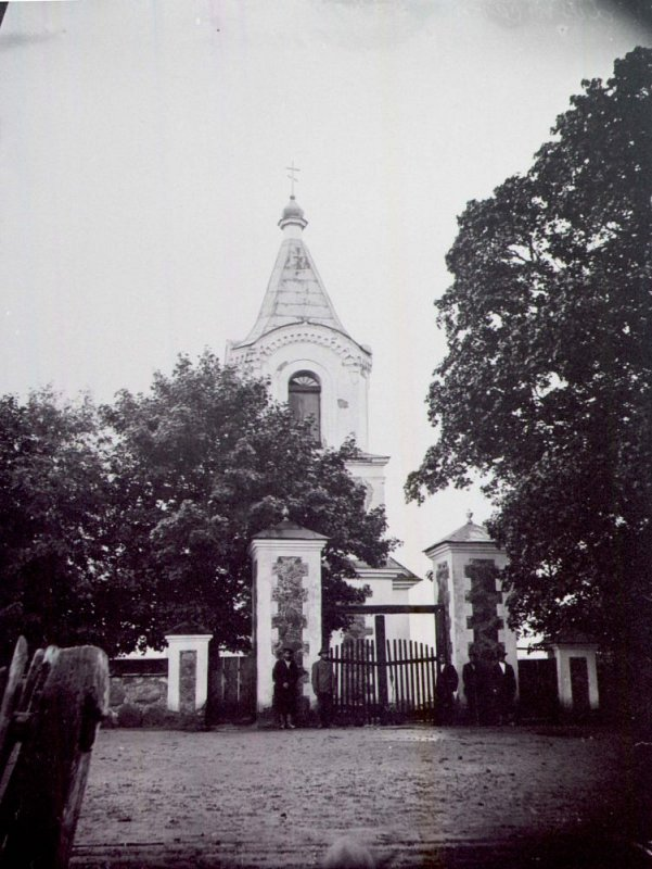 Беларуская (тарашкевіца): Лоск (Łosk). Юраўская царква-мураўёўка